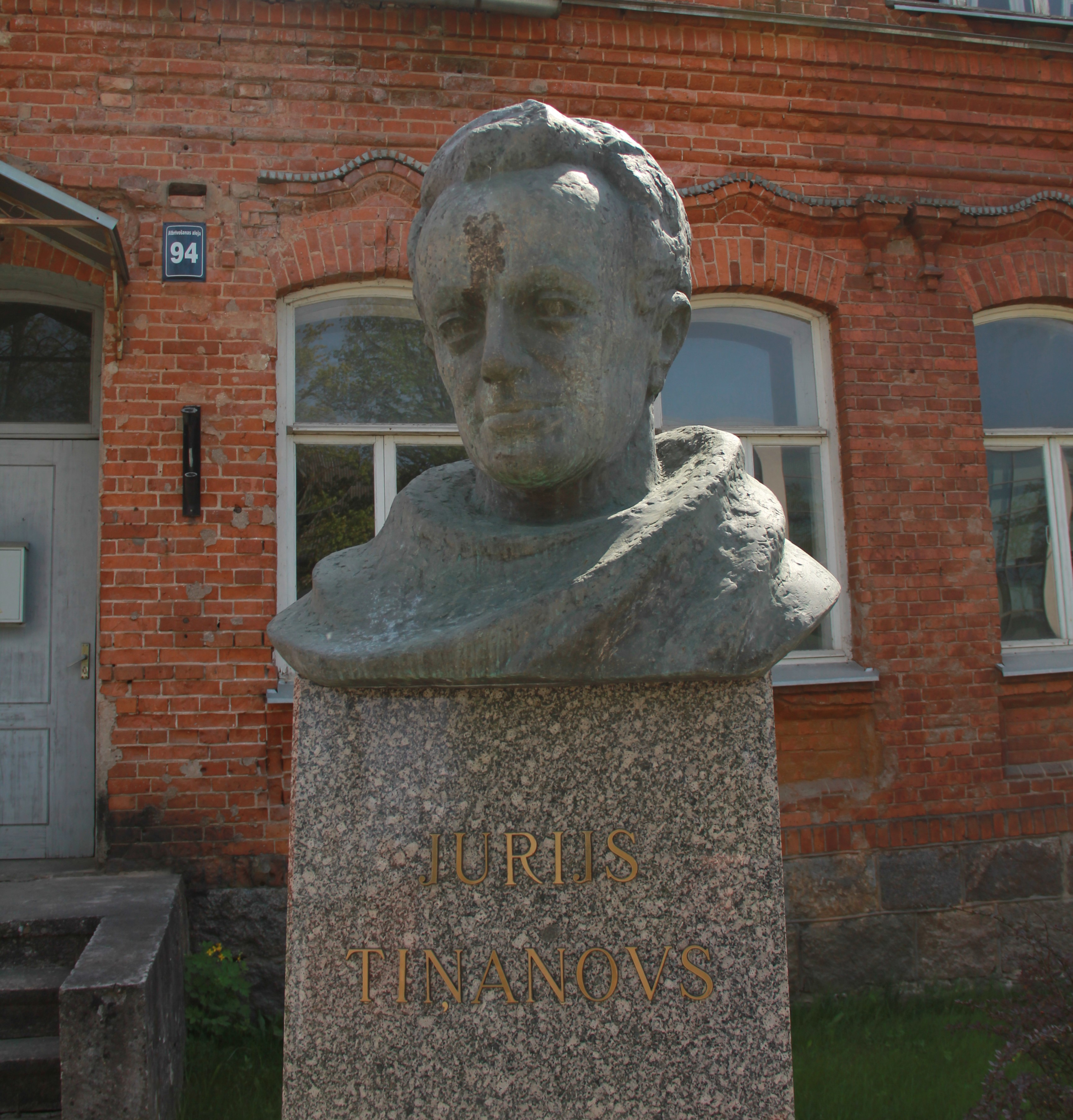 Tiņanova pieminekļis pie mājas, kur viņā dzīvoja.